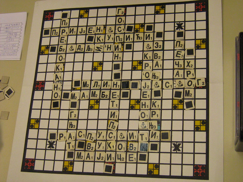 Пример одигране партије квизовке